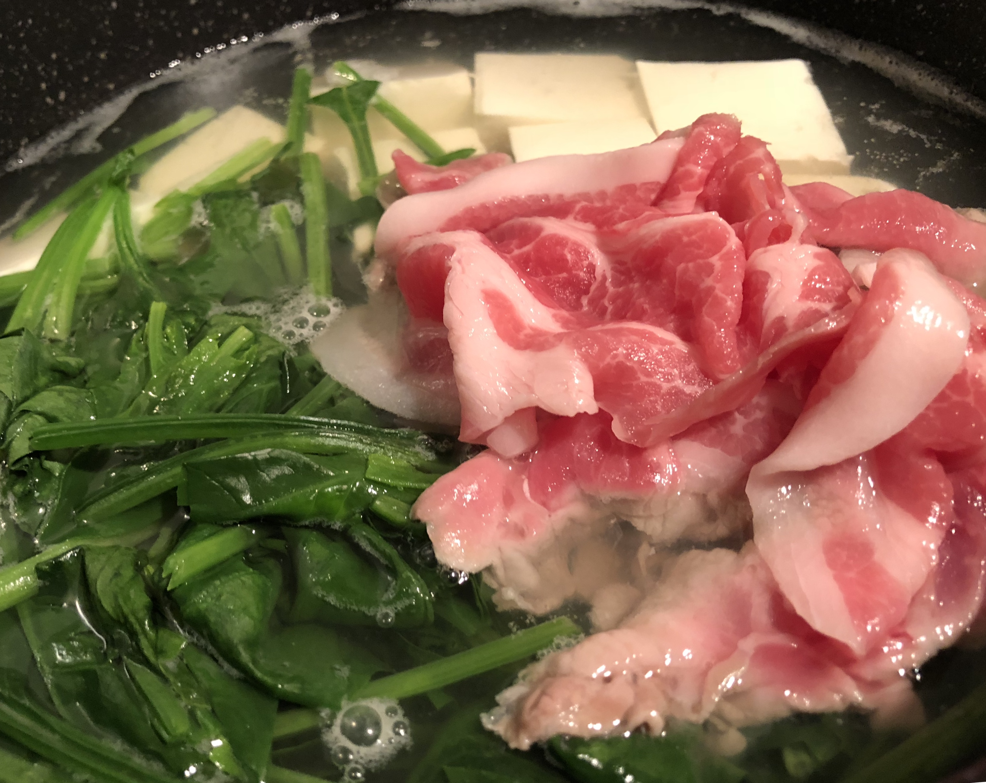 常夜鍋。湯気で曇ったりアクで濁らないよう肉を入れたタイミングで火を止めて撮影…。